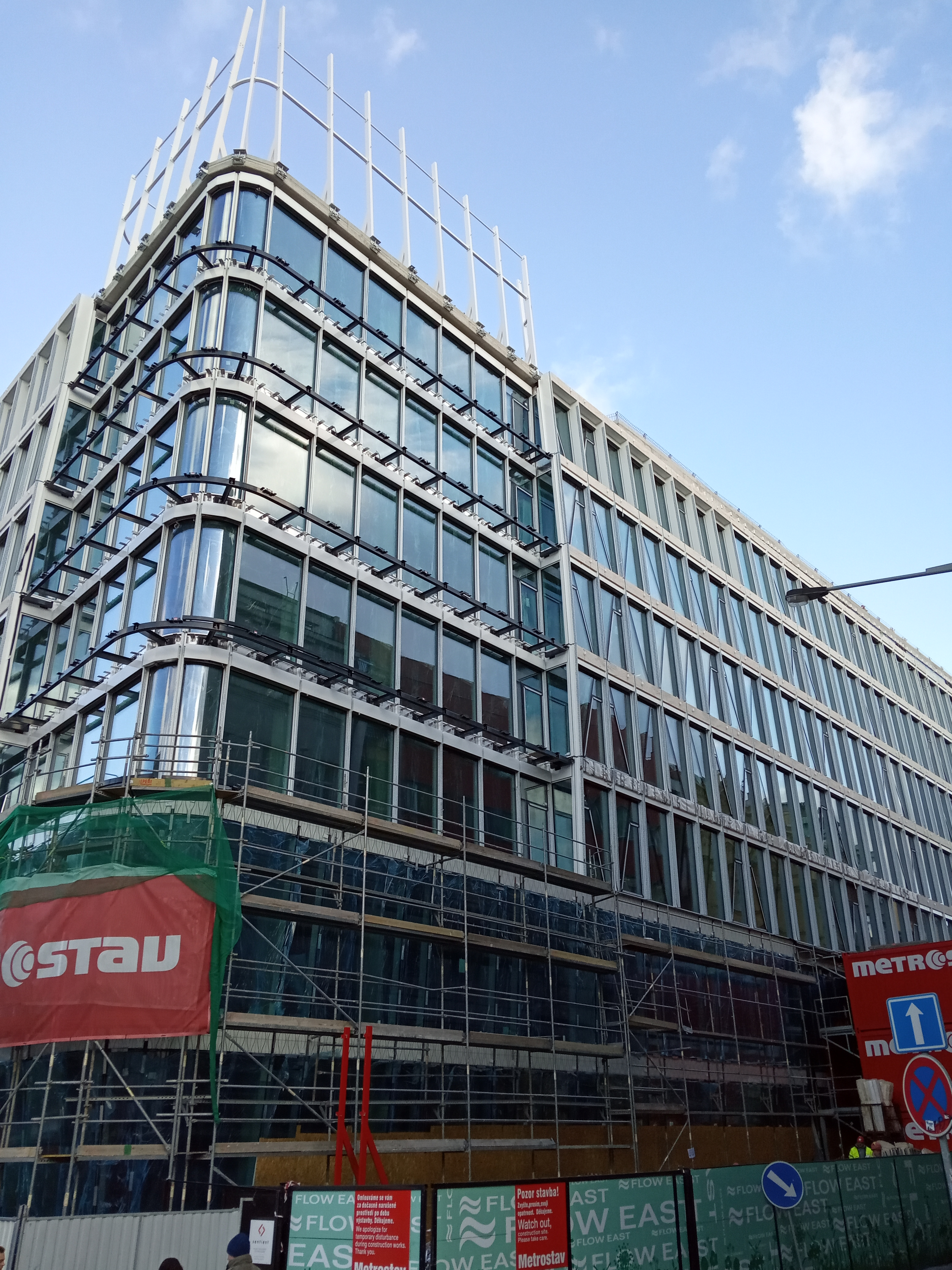 Praha - Nové Město, Václavské náměstí/Opletalova - stavba The Flow Building (dříve Květinový dům)